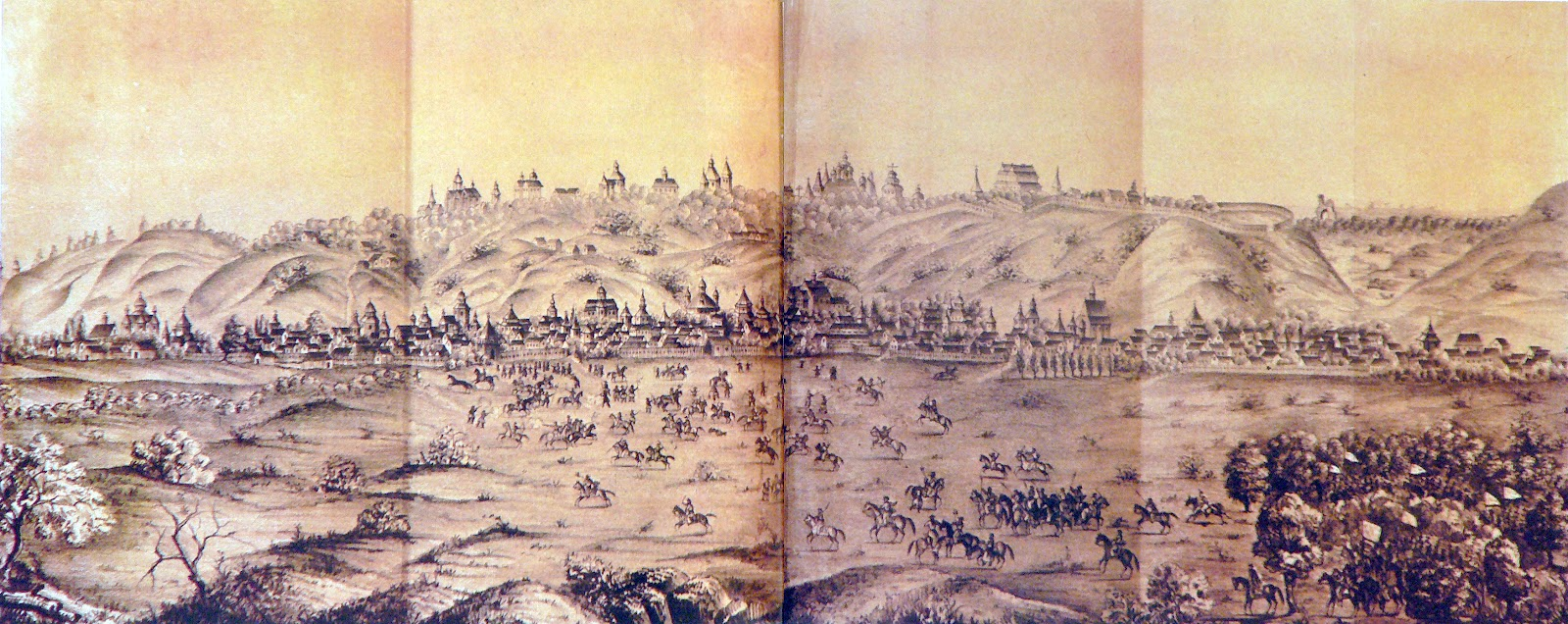 А. ван Вестерфельд. Загальний вигляд Києва з північного сходу. 1651 р. (Копія 18 ст.)